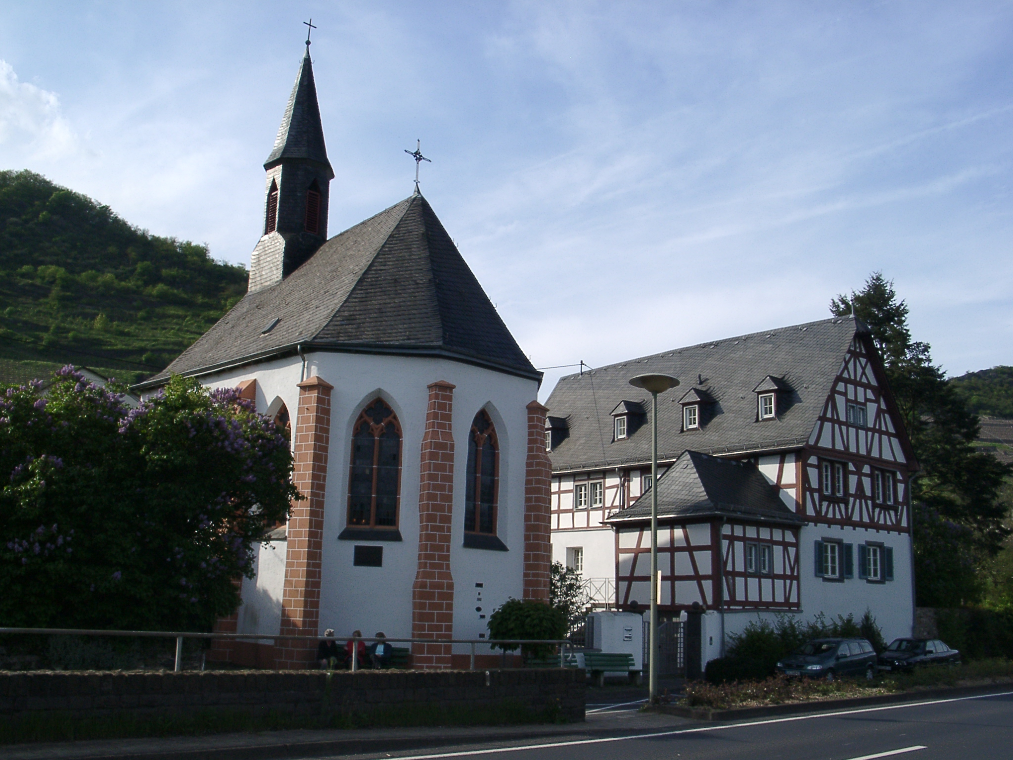 Ev. Kirche (ehem. Georgskapelle) in Karden - selbst fotografiert (Klaus Graf) 30.4.2005